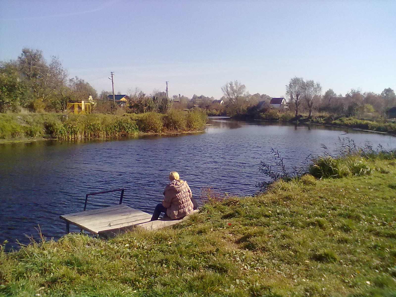 Ставок у дачному селищі неподалік від платформи "Трубіж". Село Марківці, Бобровицький район, Чернігівська область.